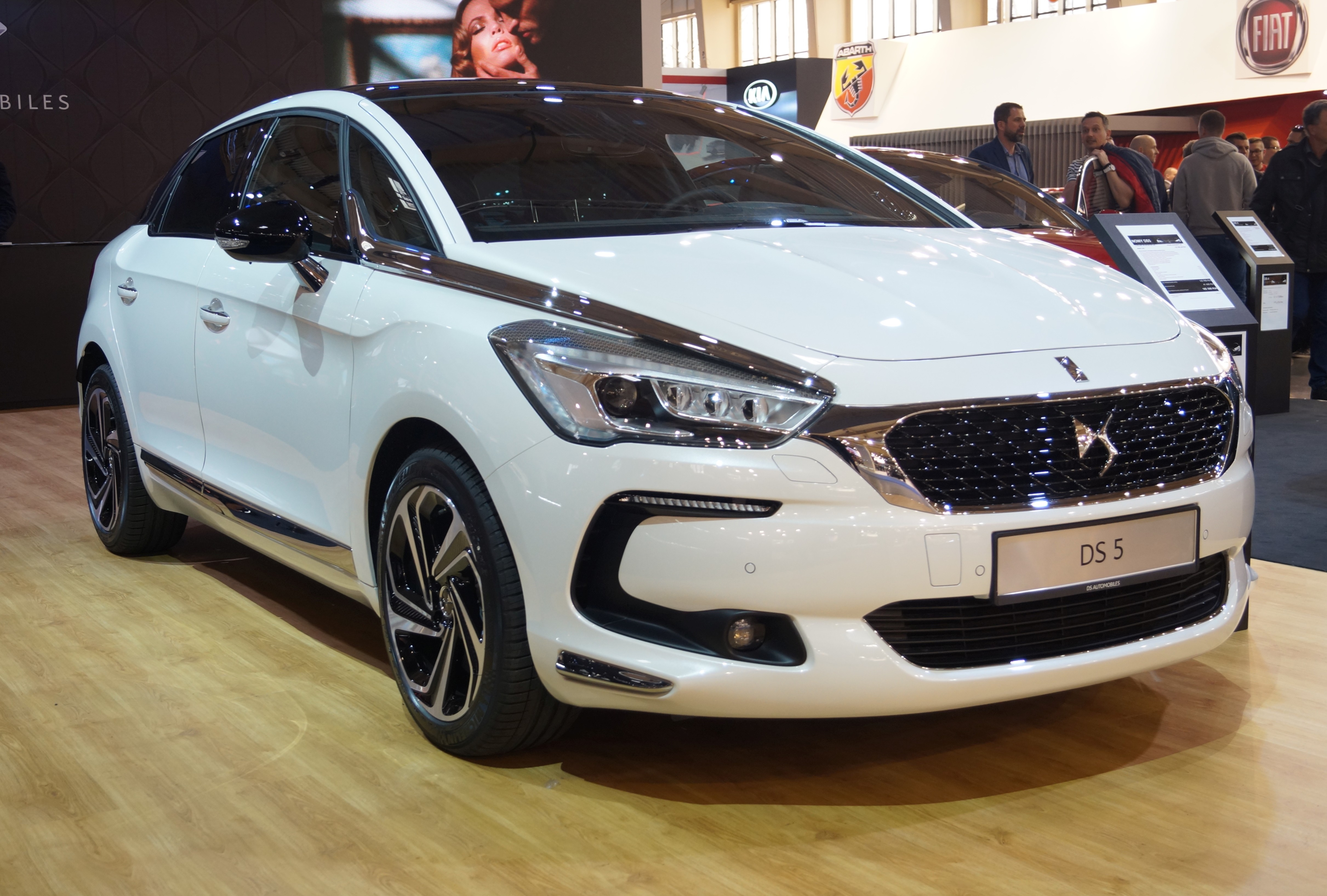 Prawy przód DS 5 na Motor Show Poznań 2017.